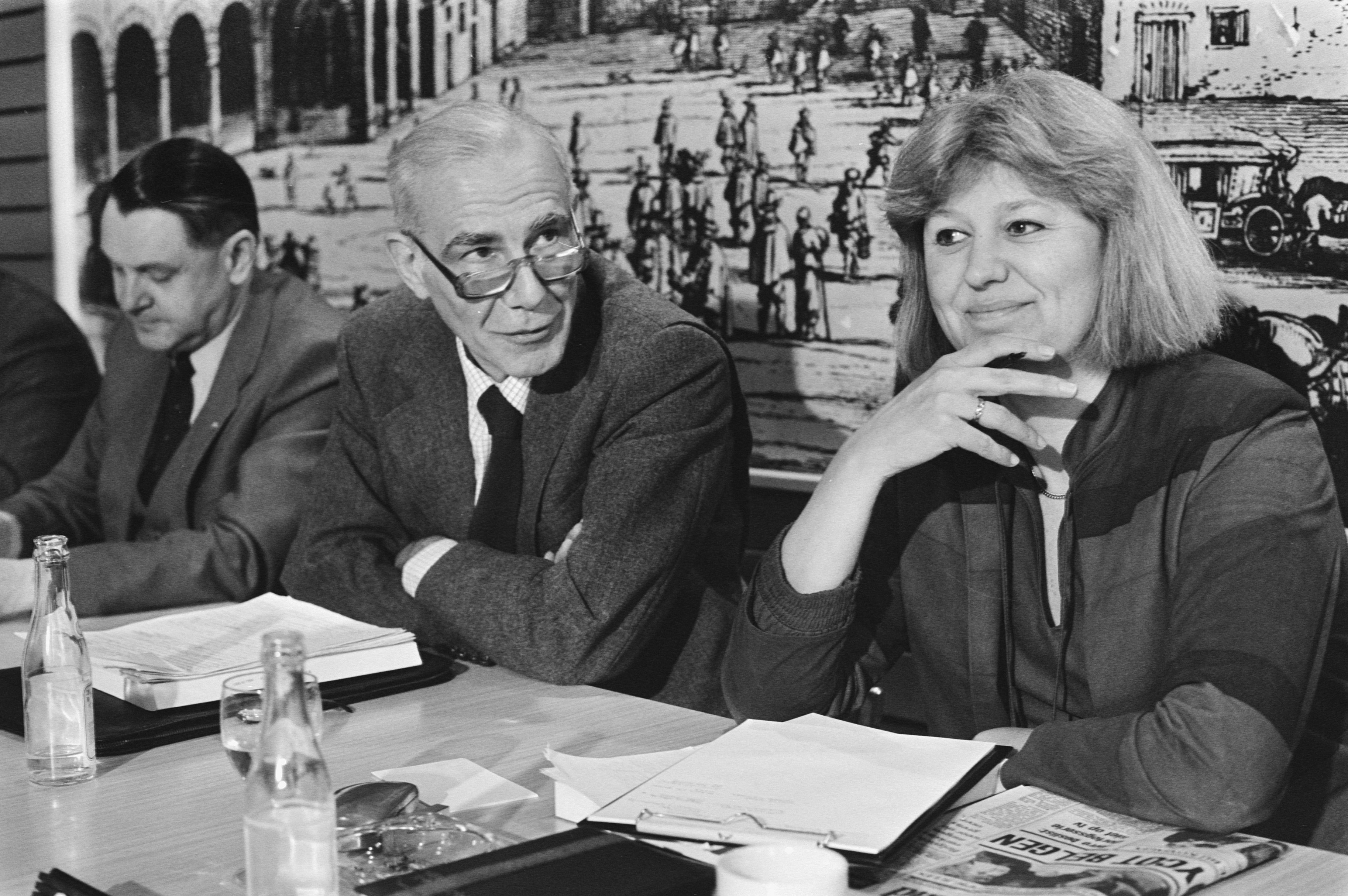 Persconferentie Algemene Rekenkamer over jaarverslag; president Frans Kordes en lid Saskia Stuiveling. Links wrsch. H.H.G. Koolen